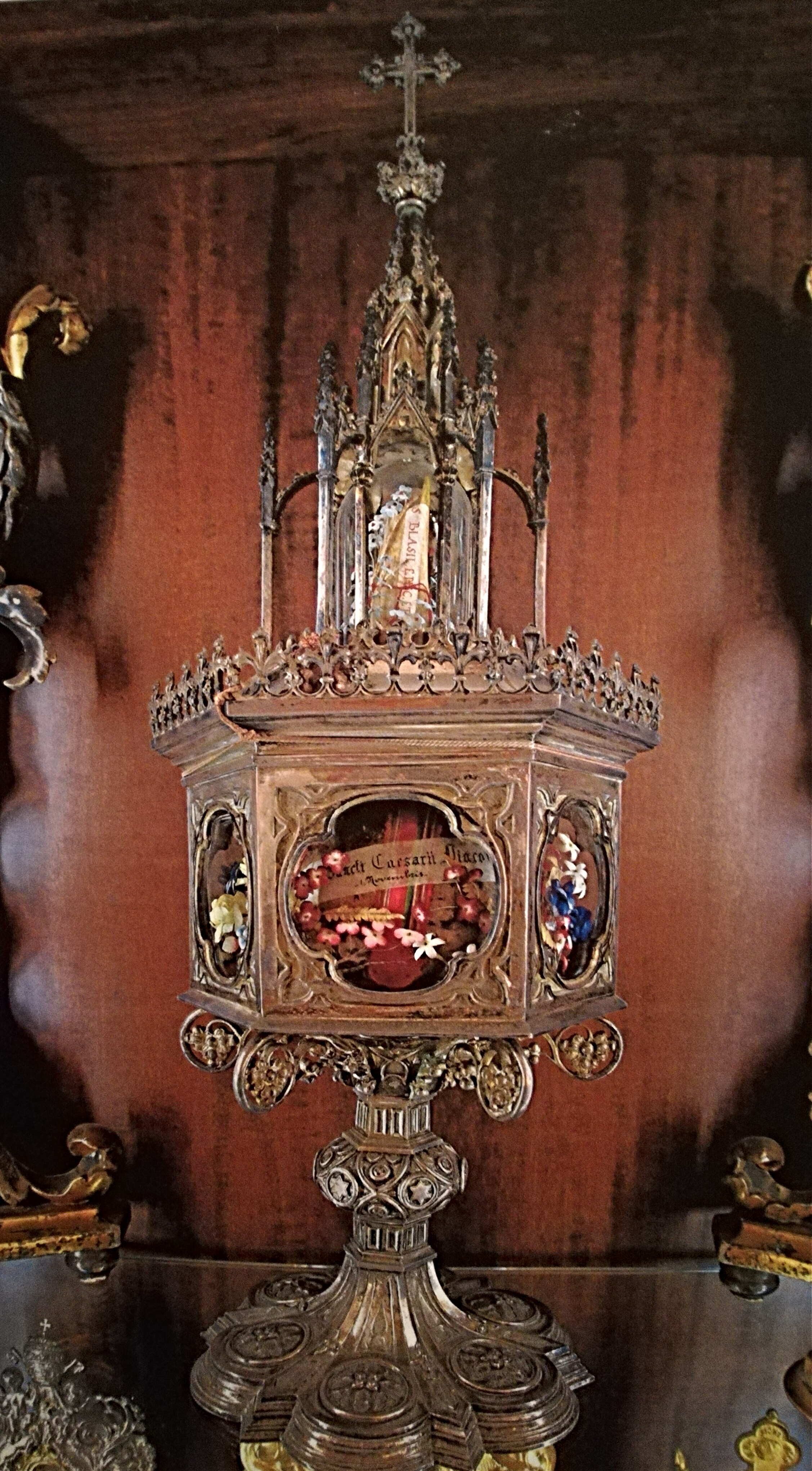 Reliquiario argenteo del capo di San Cesario diacono e martire, Chiesa di San Pietro, Modena